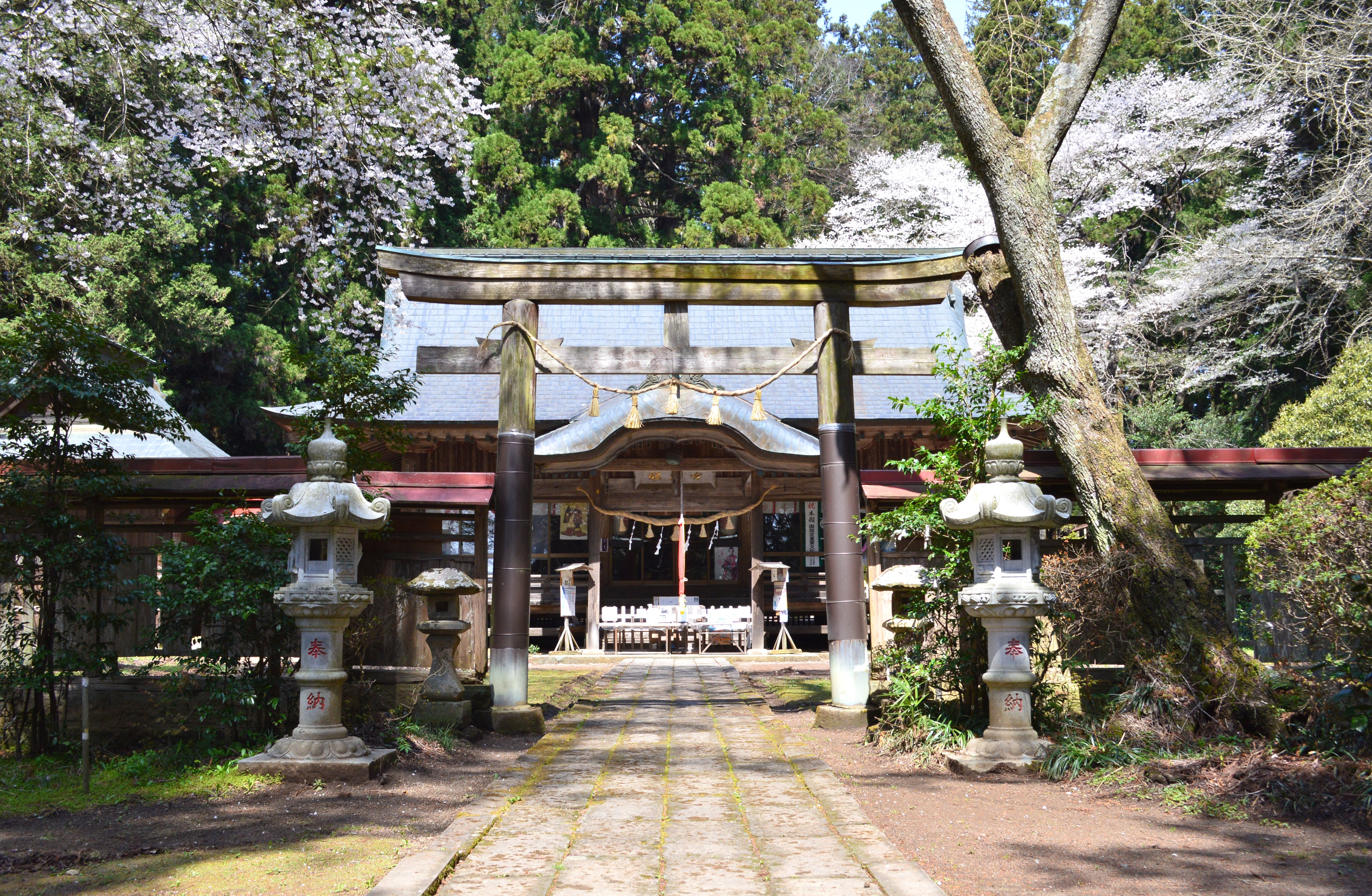 馬場都々古別神社 正面